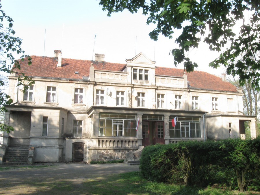 Niechłód - dwór z 1907 r. (zabytek nr rejestr. 513/Wlkp/A)